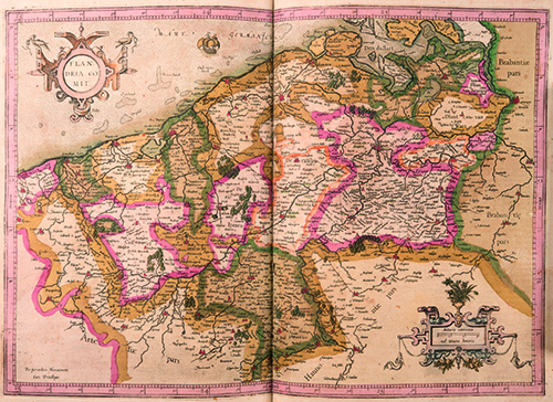 Gerard Mercator & Jodocus Hondius, L’artlas ou meditations cosmographiques de la fabrique du monde, 1610, papier.